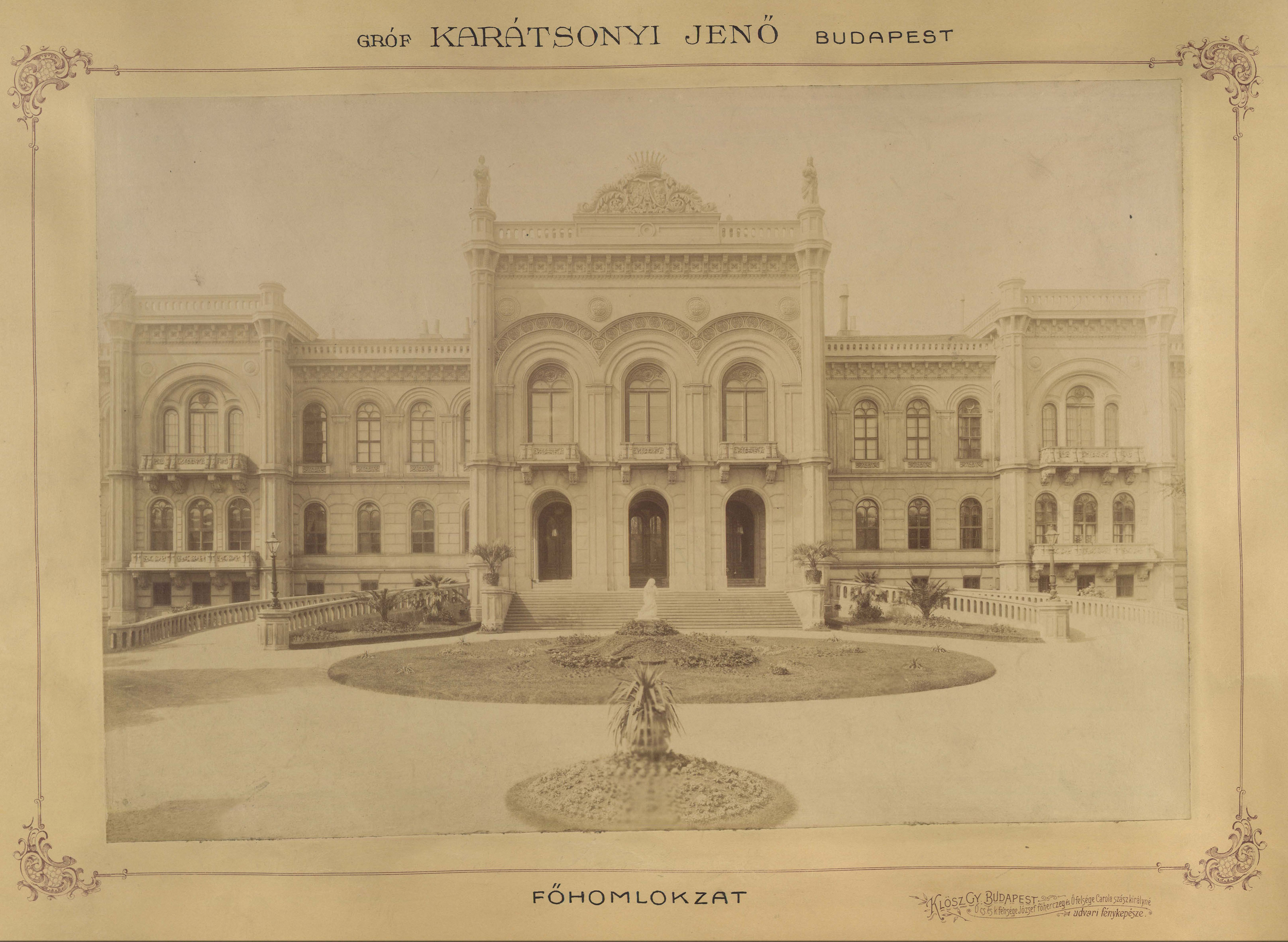 Krisztina körút 55., a Karátsonyi-palota (lebontották) főhomlokzata. A felvétel 1895-1899 között készült. A kép forrását kérjük így adja meg: Fortepan / Budapest Főváros Levéltára. Levéltári jelzet: HU.BFL.XV.19.d.1.11.070 Location: Hungary, Budapest I.